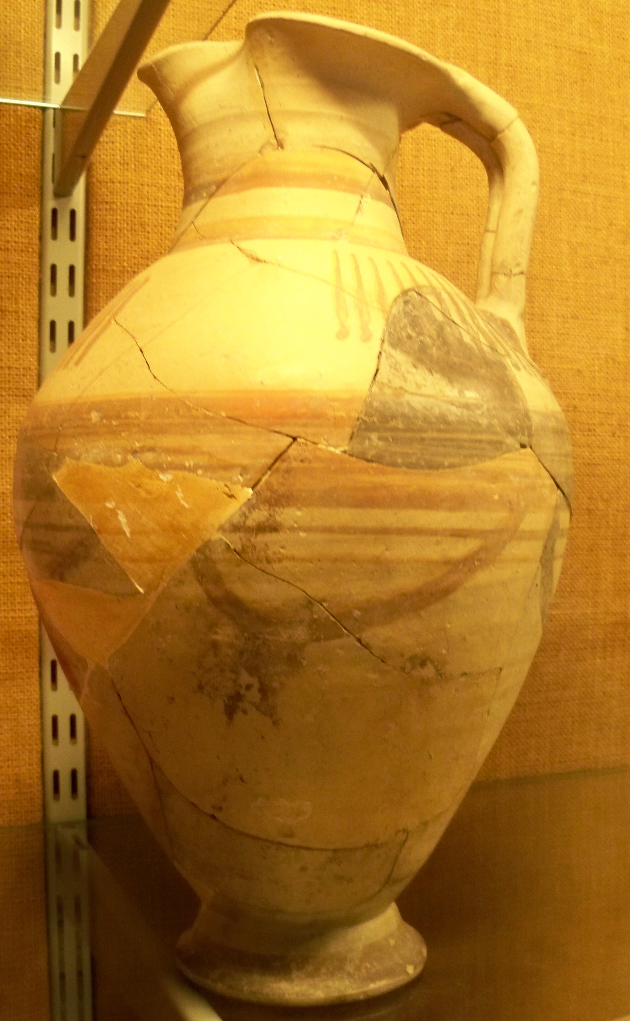 Oenoché au musée du Pégue, Drôme, France